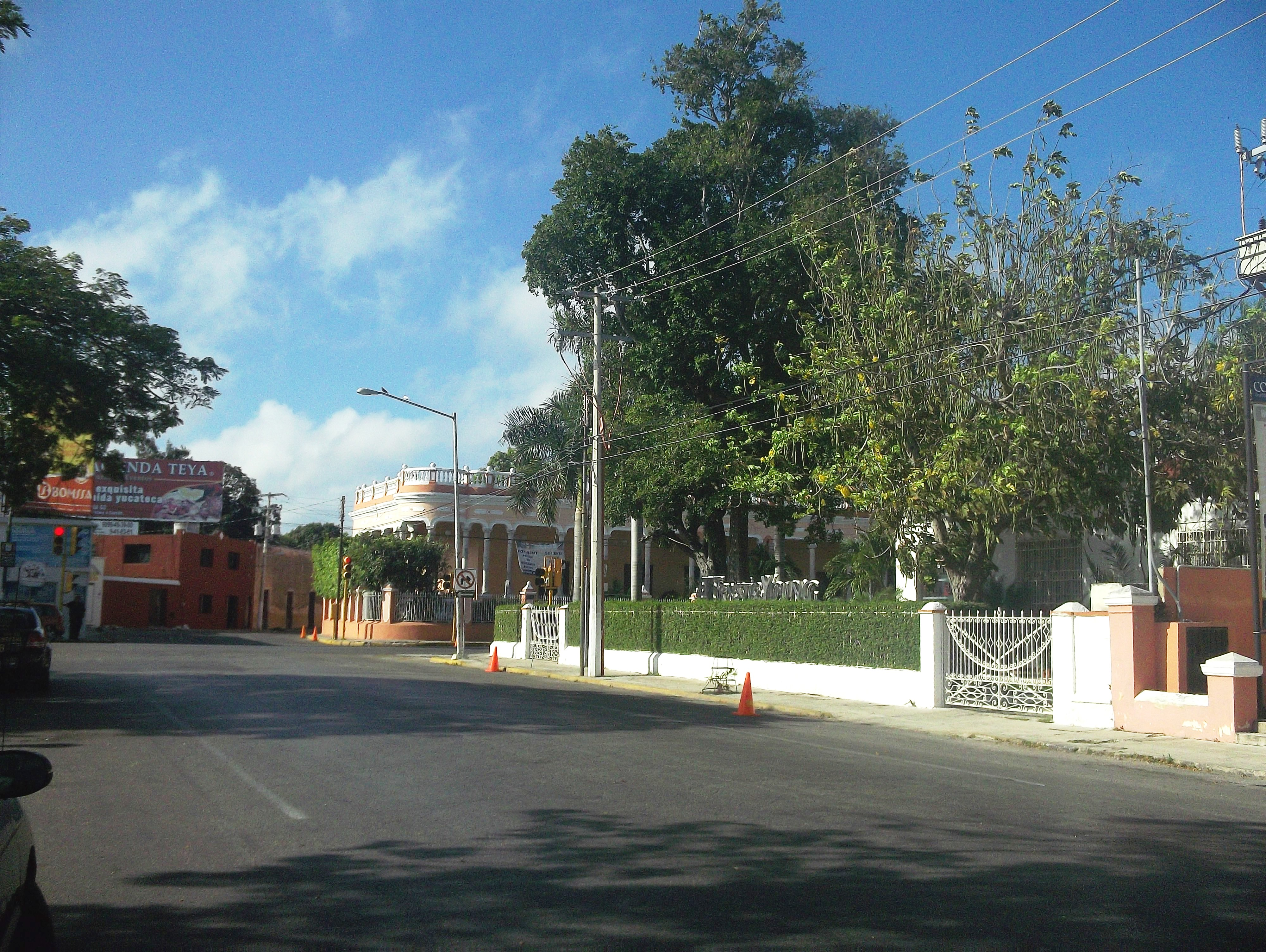 El Callejón del Árbol, Mérida, Yucatán.